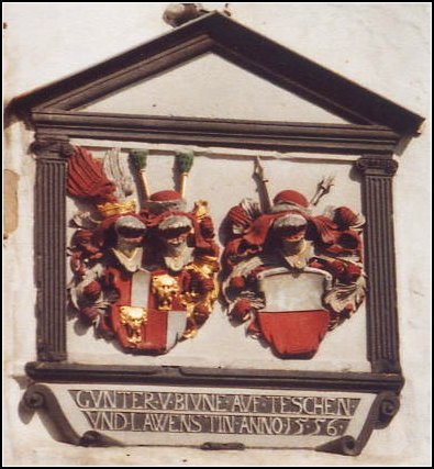 Lauenstein: Bünauisches Wappen (1556) am Schloss